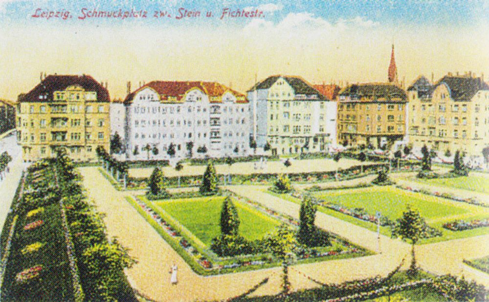 Der Steinplatz in Leipzig zur Zeit seiner Entstehung